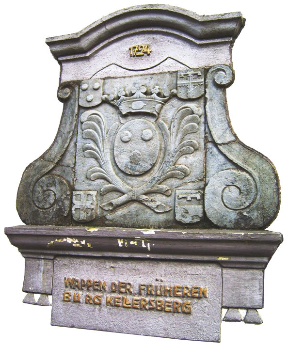 Wappen des Schlosses Kellersberg am Kellersberger Hof beim Alsdorfer Stadtteil Kellersberg